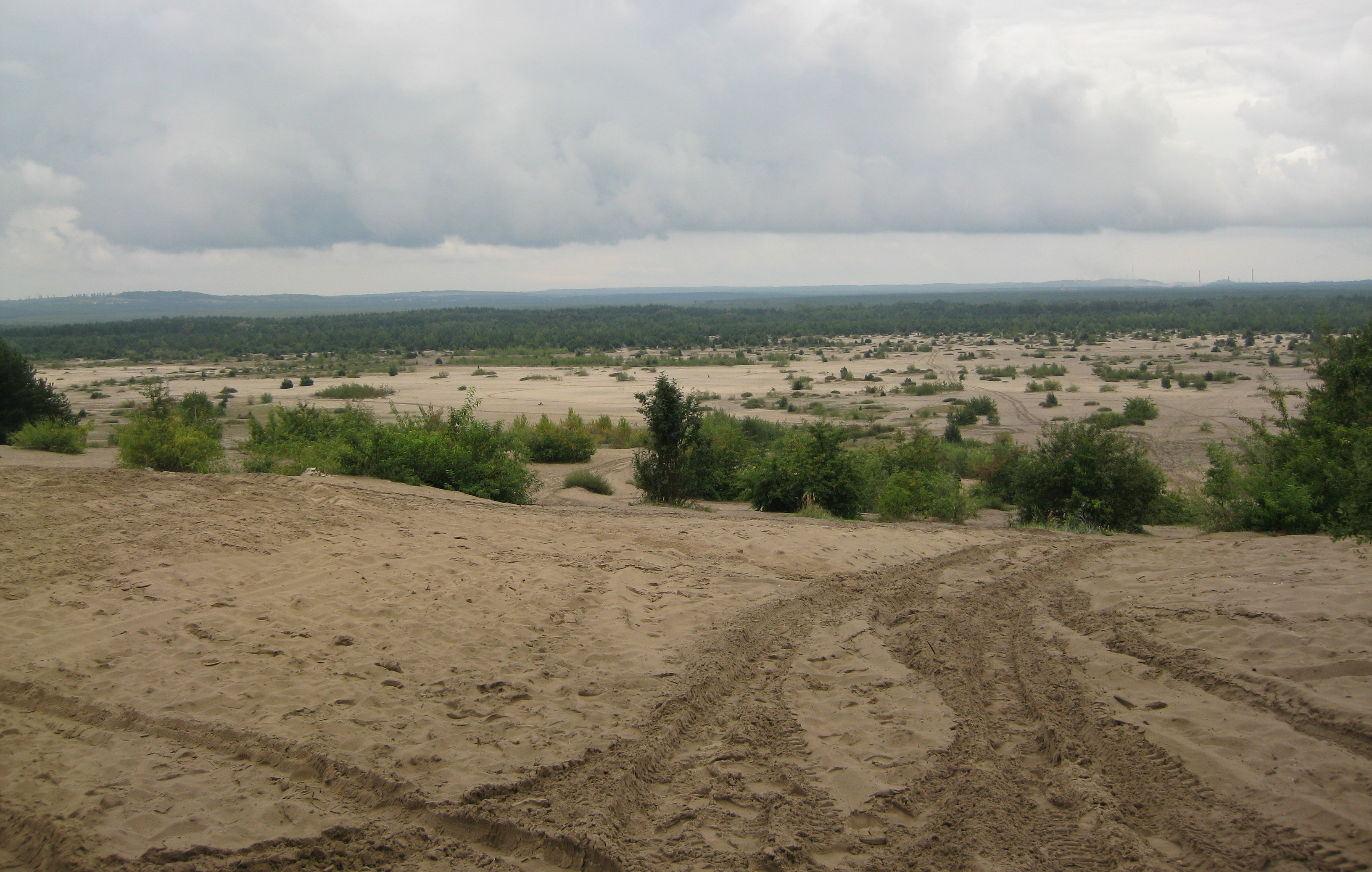 Pustynia Błędowska widziana z punktu widokowego na wschód od miejscowości Chechło